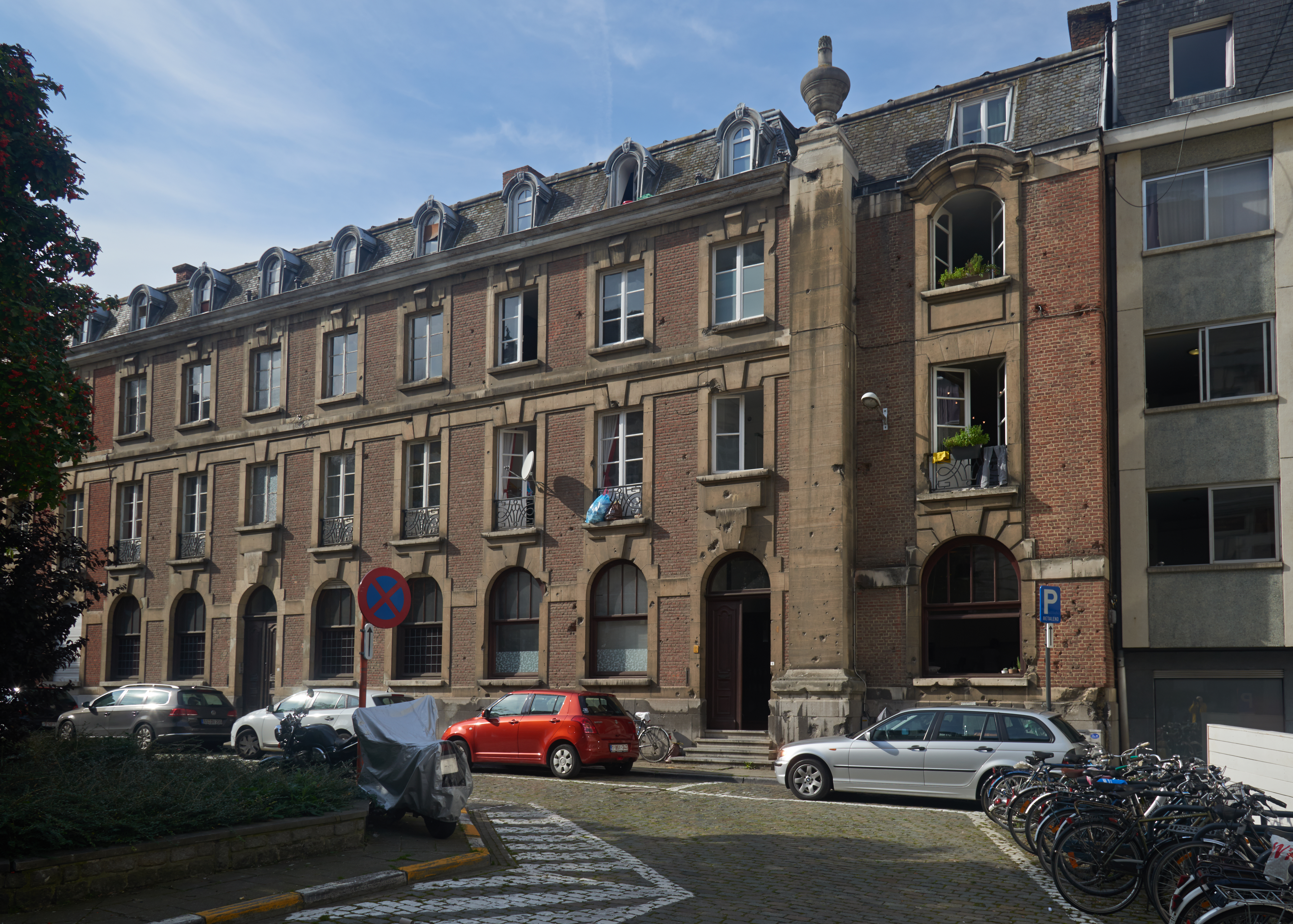 Leuven, Ferdinand Smoldersplein 4